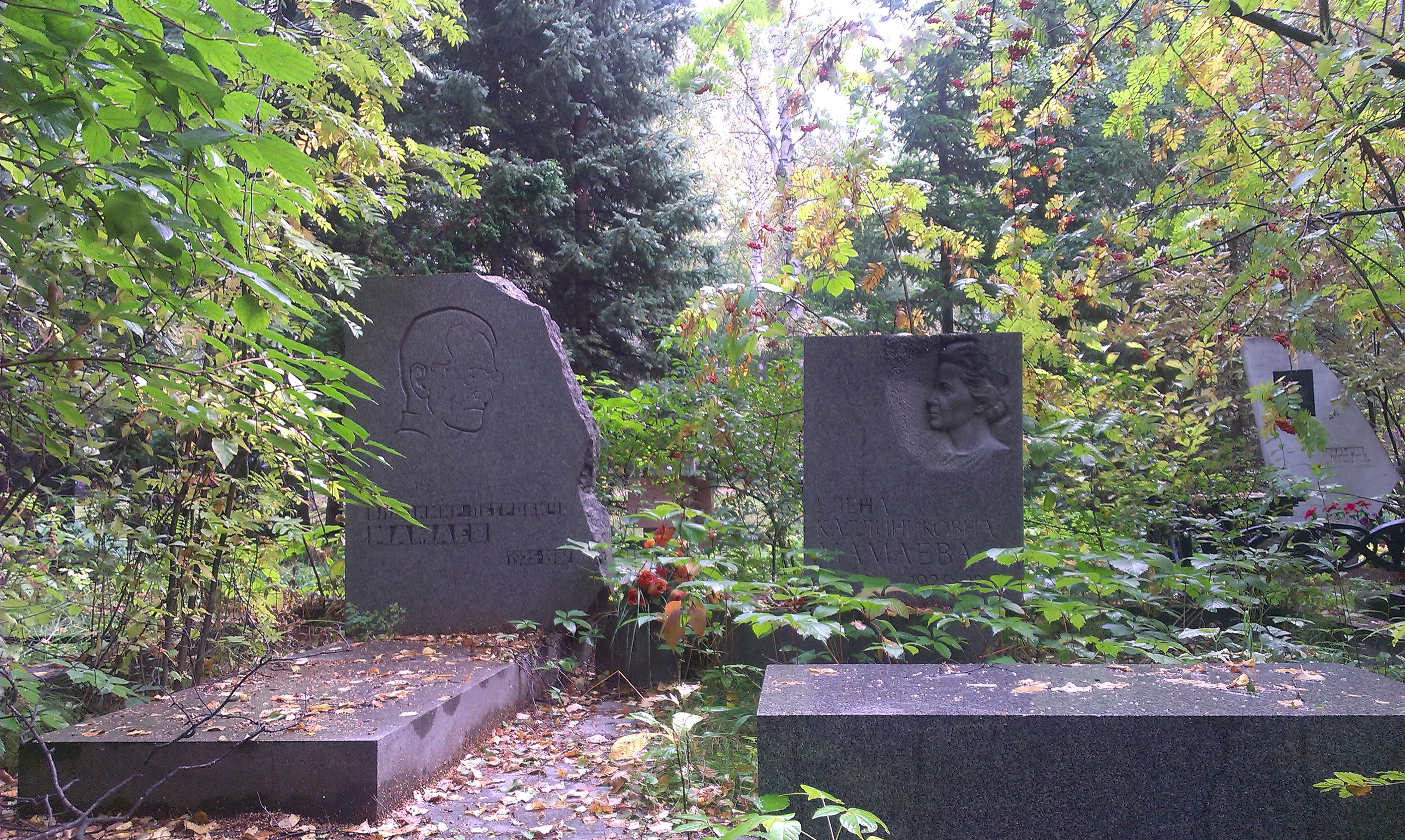 Южное (Чербузинское) кладбище